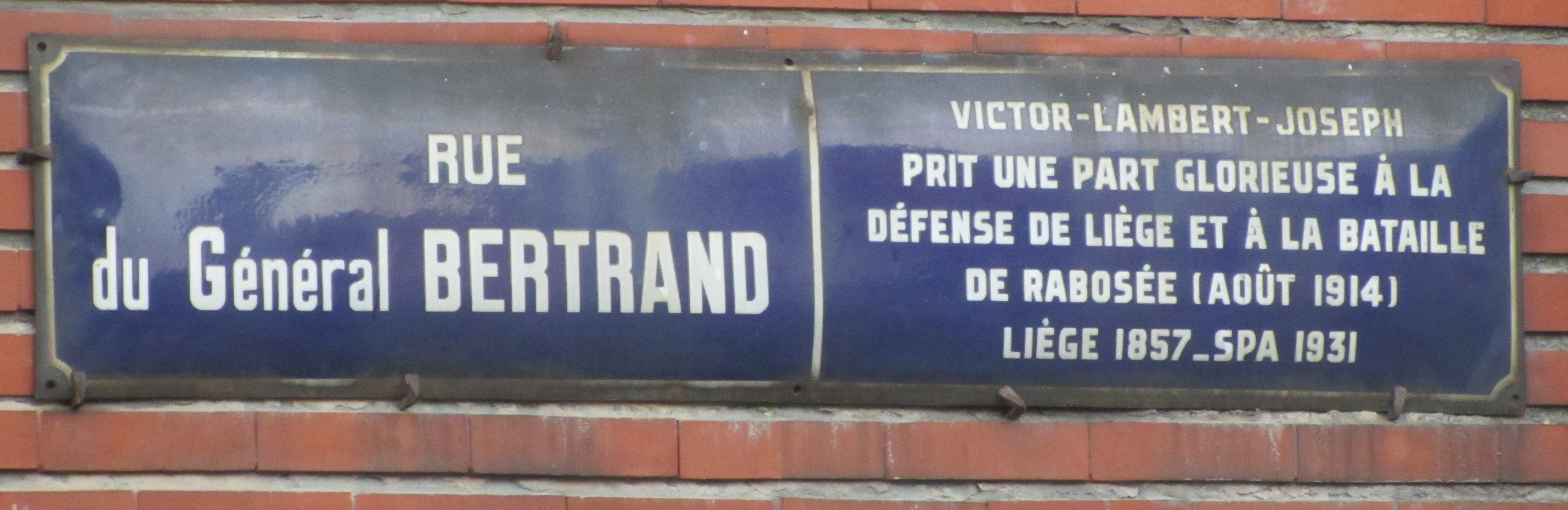 Plaque de la rue du Général Bertrand à Liège dans le quartier Sainte-Marguerite.